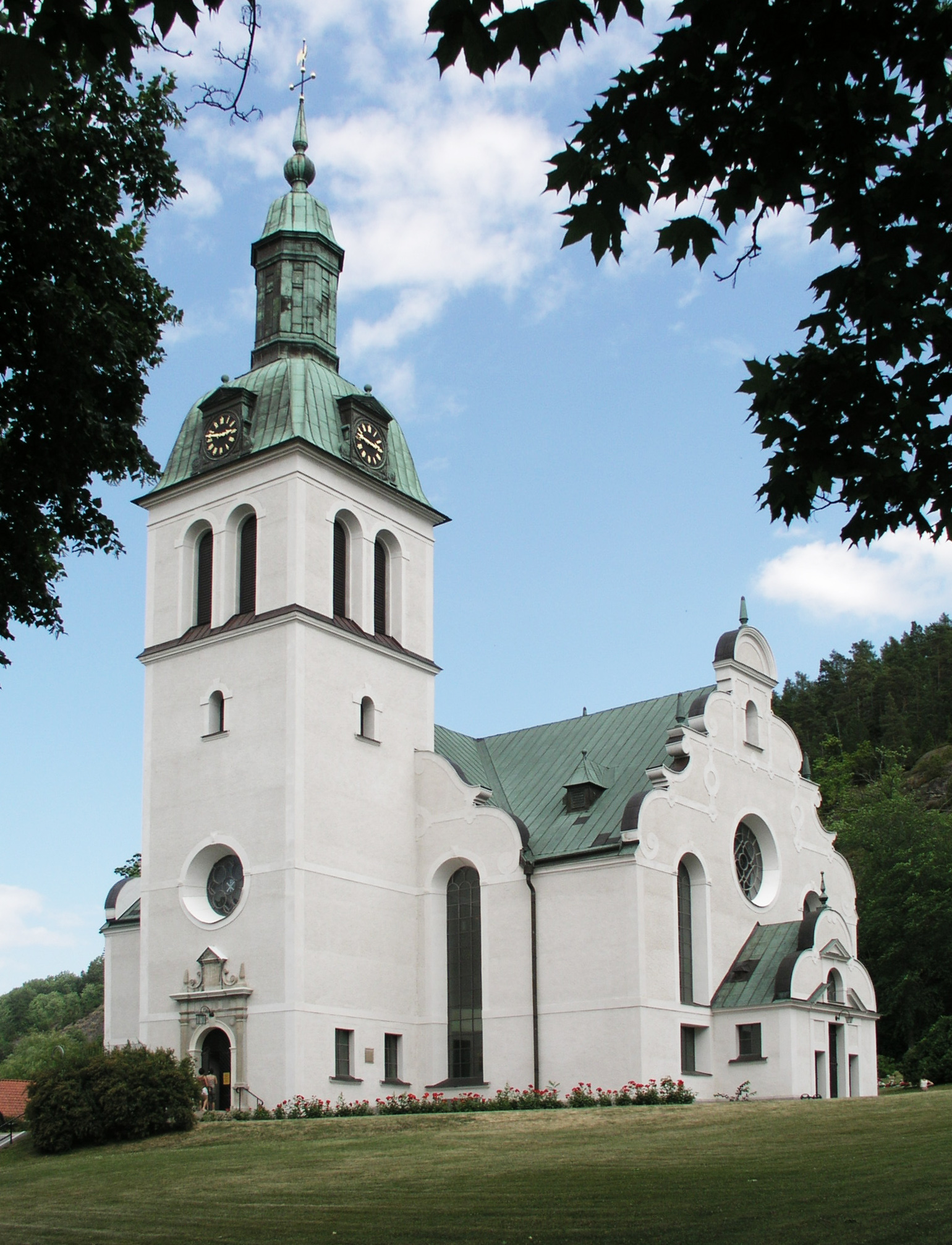 Gränna kyrka, Diocese of Växjö, Jönköping, Sweden.